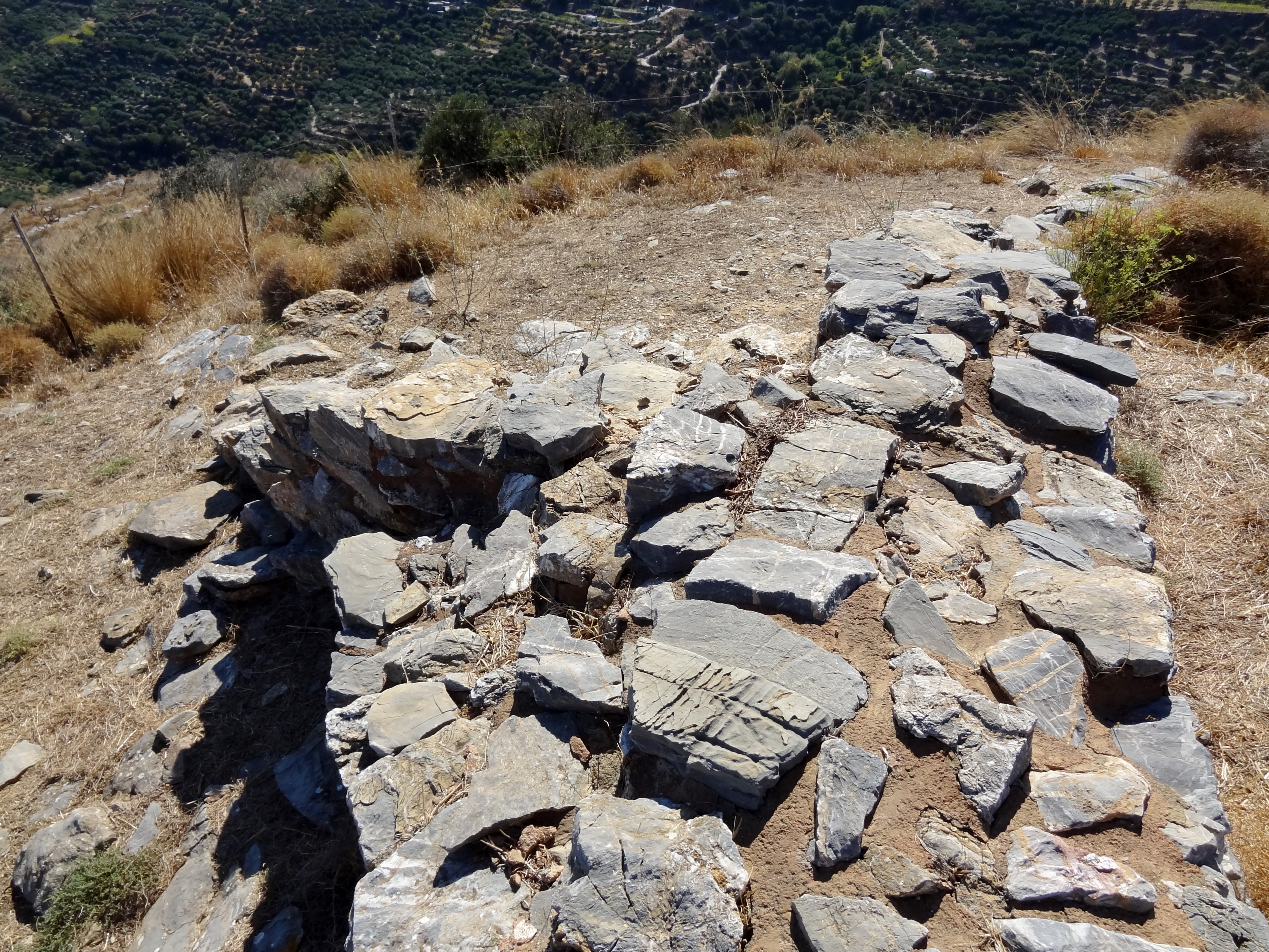 Ausgrabungsstätte des Minoischen Hauses von Chamaizi (Χαμαίζι), Gemeinde Sitia, Kreta, Griechenland